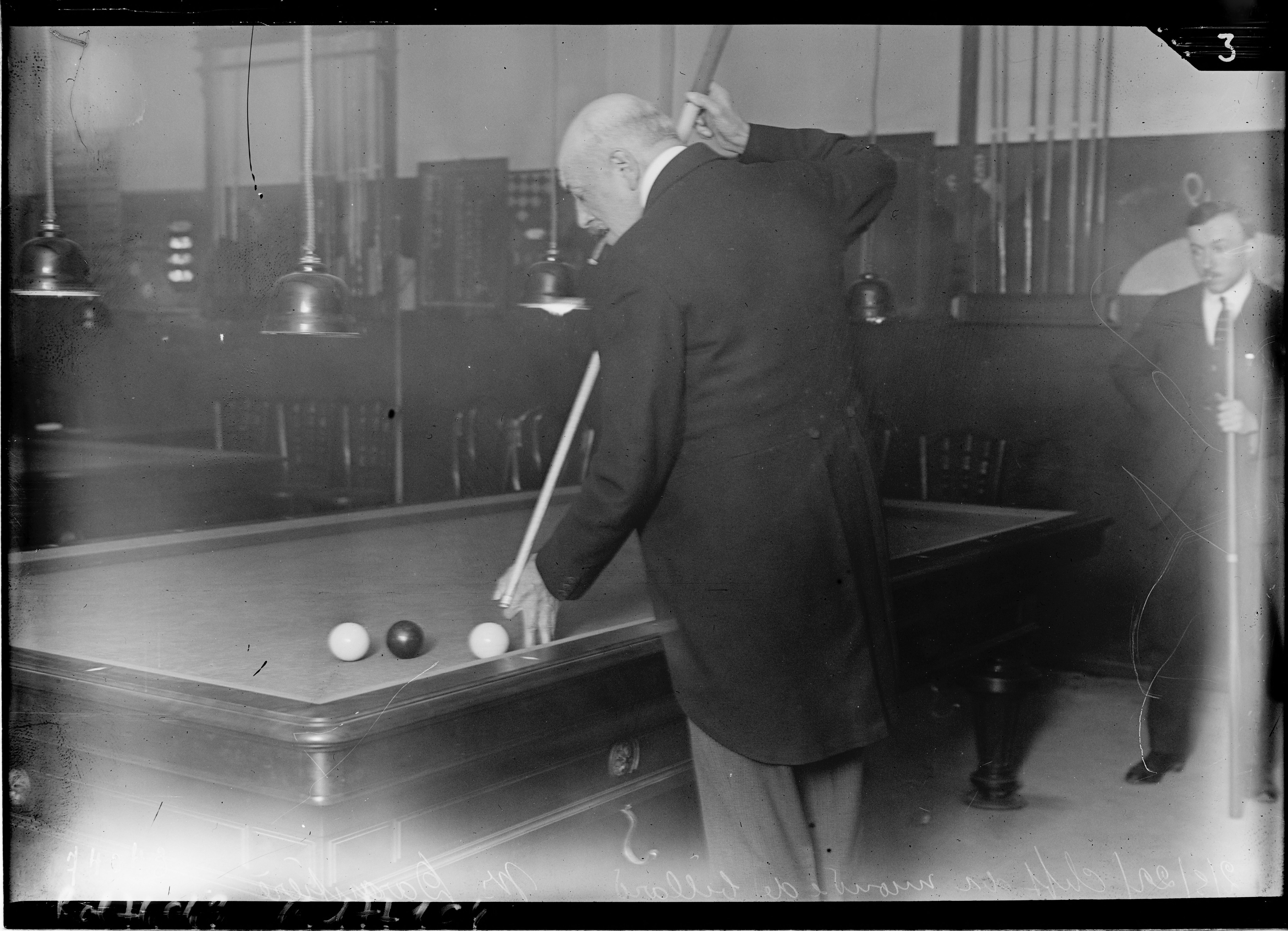 Charles Darantière bei der Cadre-45/2-Weltmeisterschaft 1922 in Paris